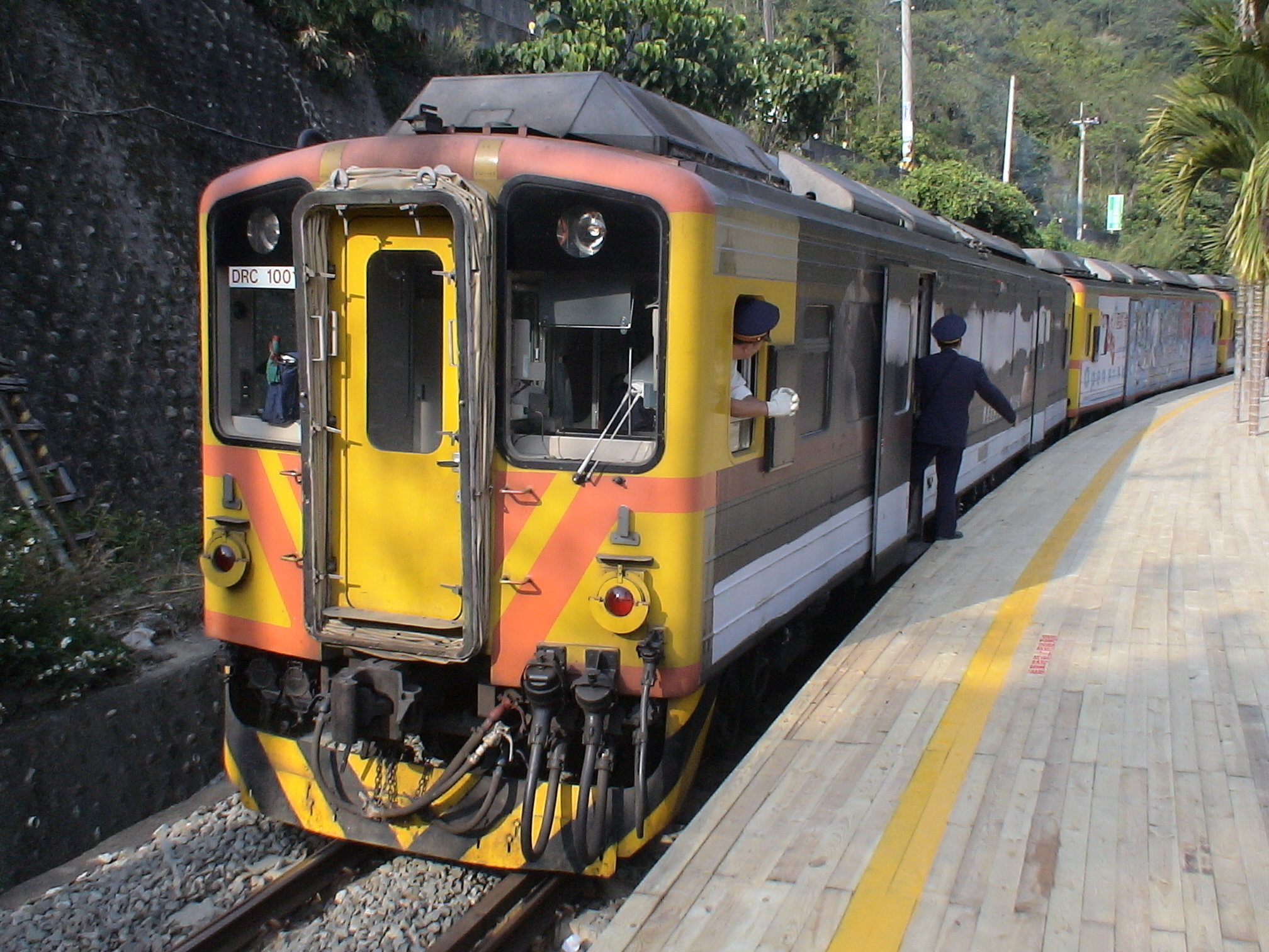 中文（台灣）: 臺灣鐵路管理局DRC1001停靠夢幻鐵道村車站。